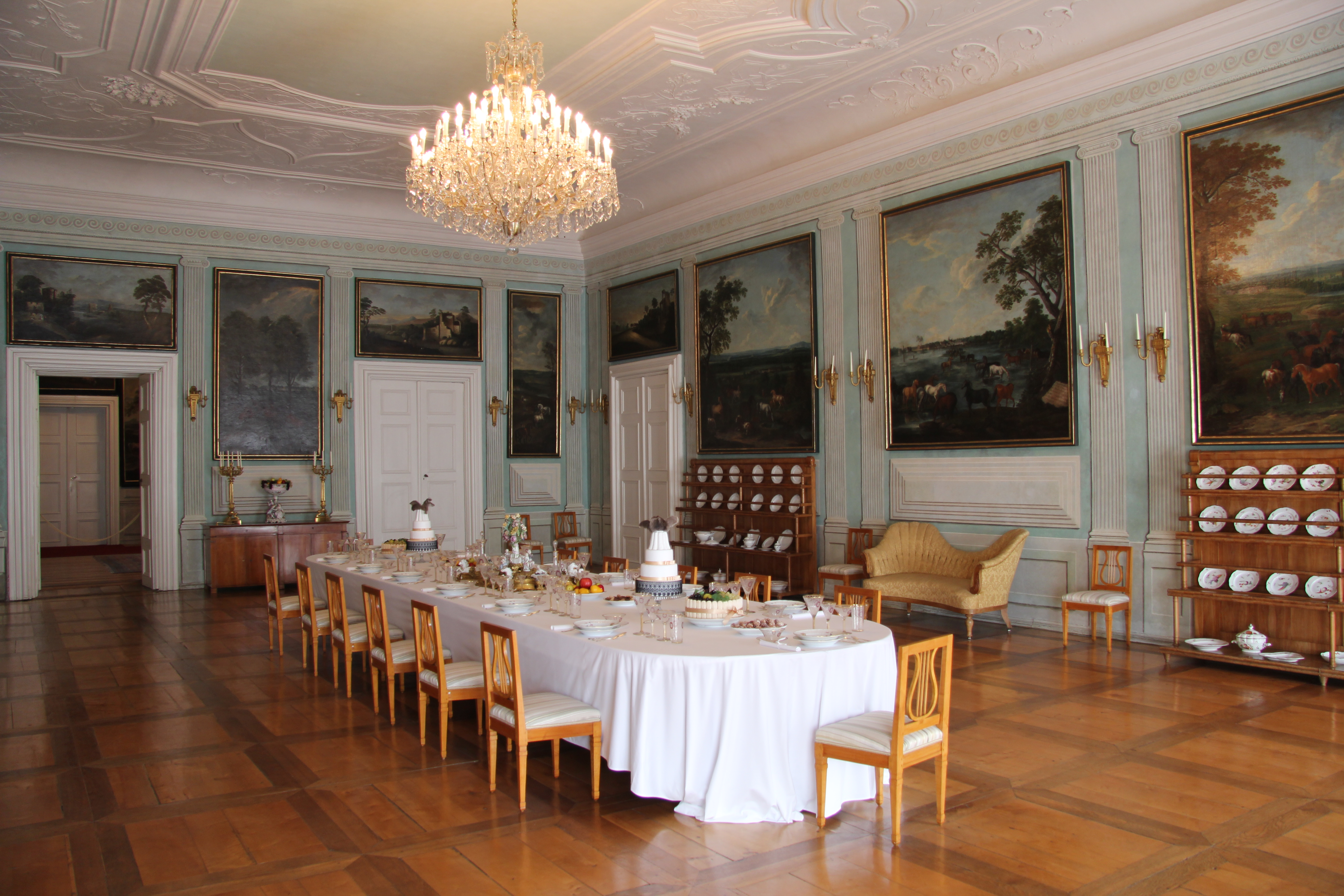 Velká jídelna na zámku v Litomyšli (2017)